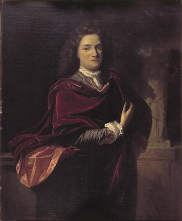 Pendant of File:Adriaen van der Werff 015.jpg.